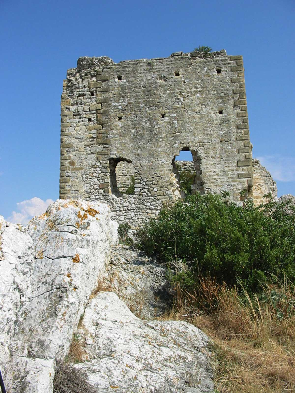 Pan de mur ruiné du château d'Aureille (Bouches-du-Rhône)